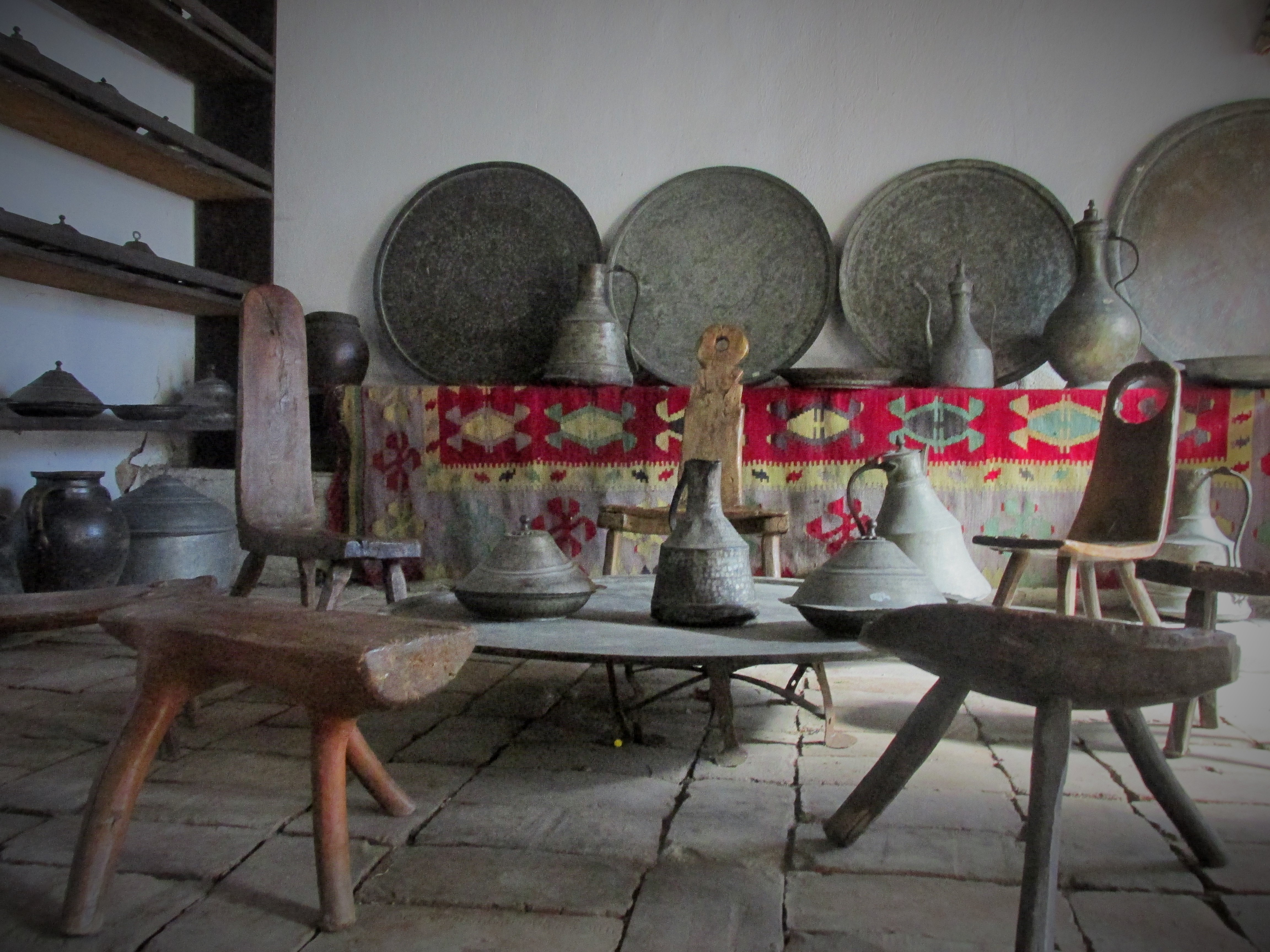 Muzeu i Kosovës